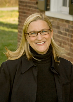 Ruta Sepetysová